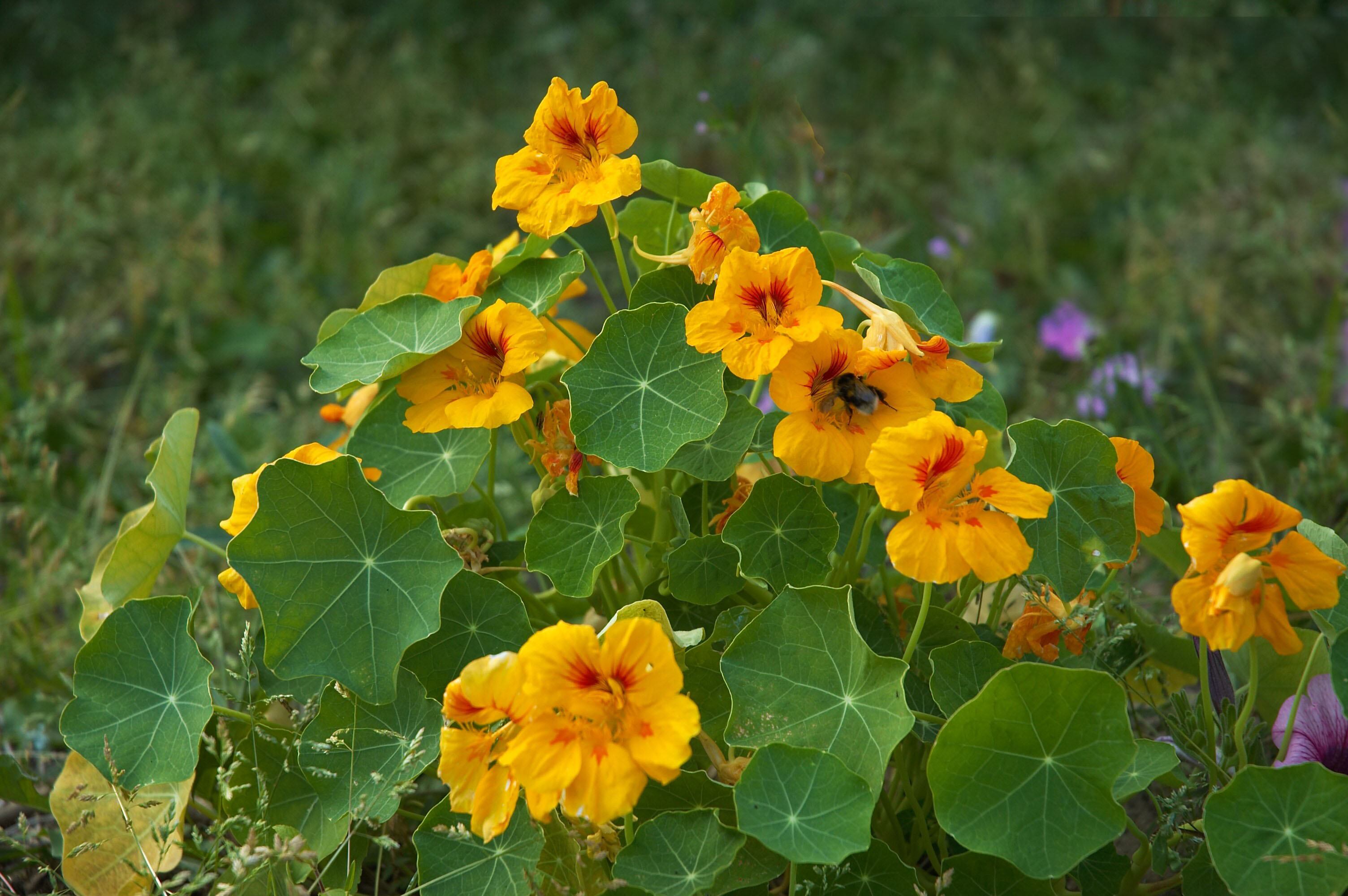 Tropaeolum majus